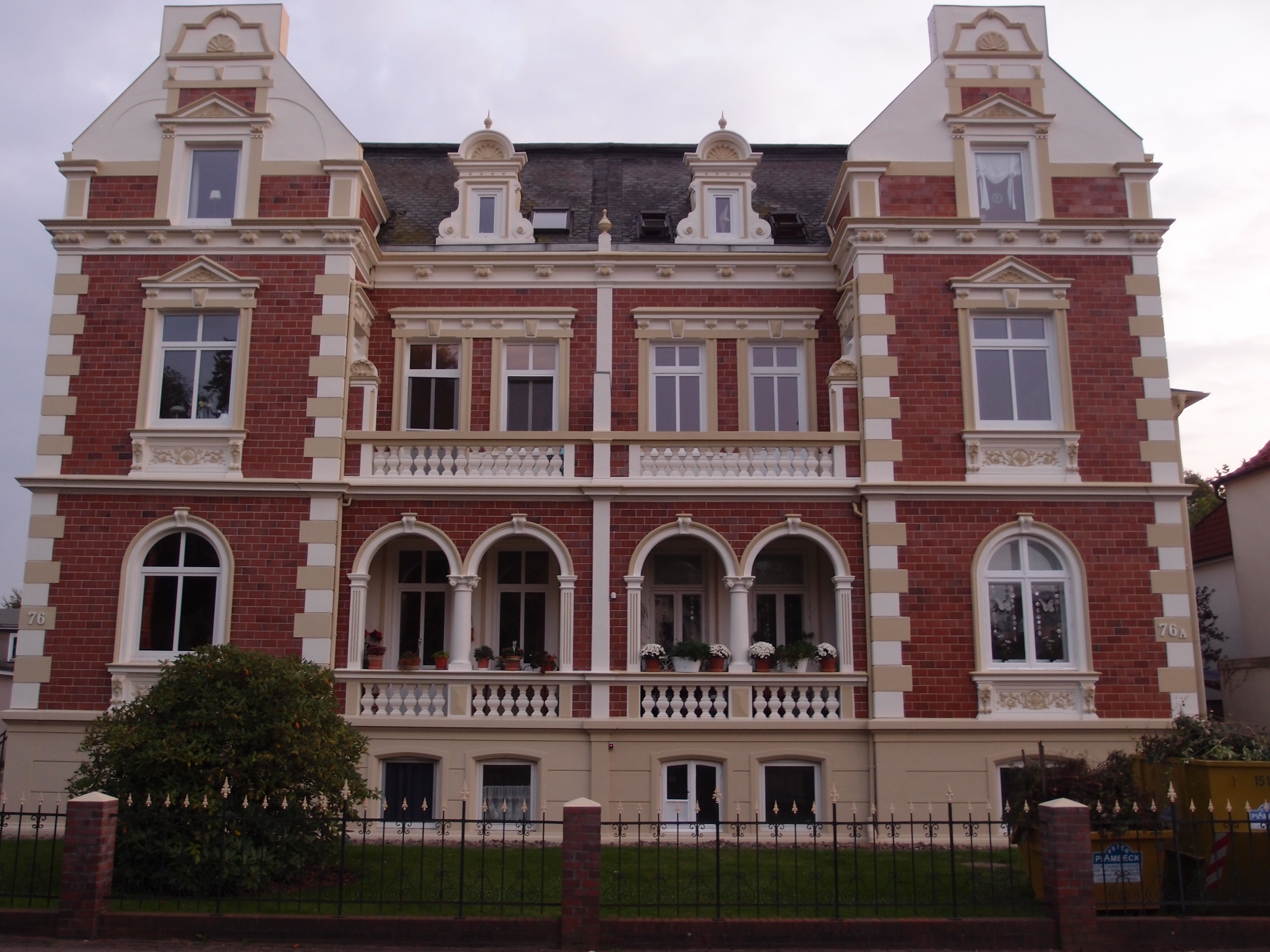 Cuxhaven Strichweg 76-76a Strassenansicht